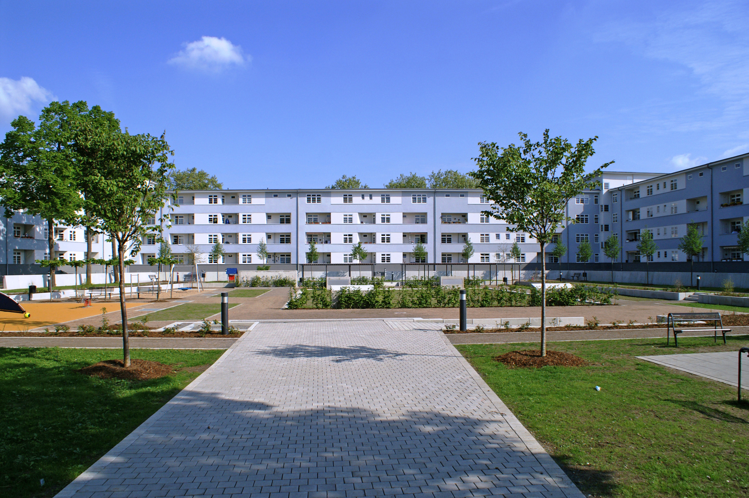 Köln-Buchforst, sanierte Wohnsiedlung Blauer Hof - Hofansicht